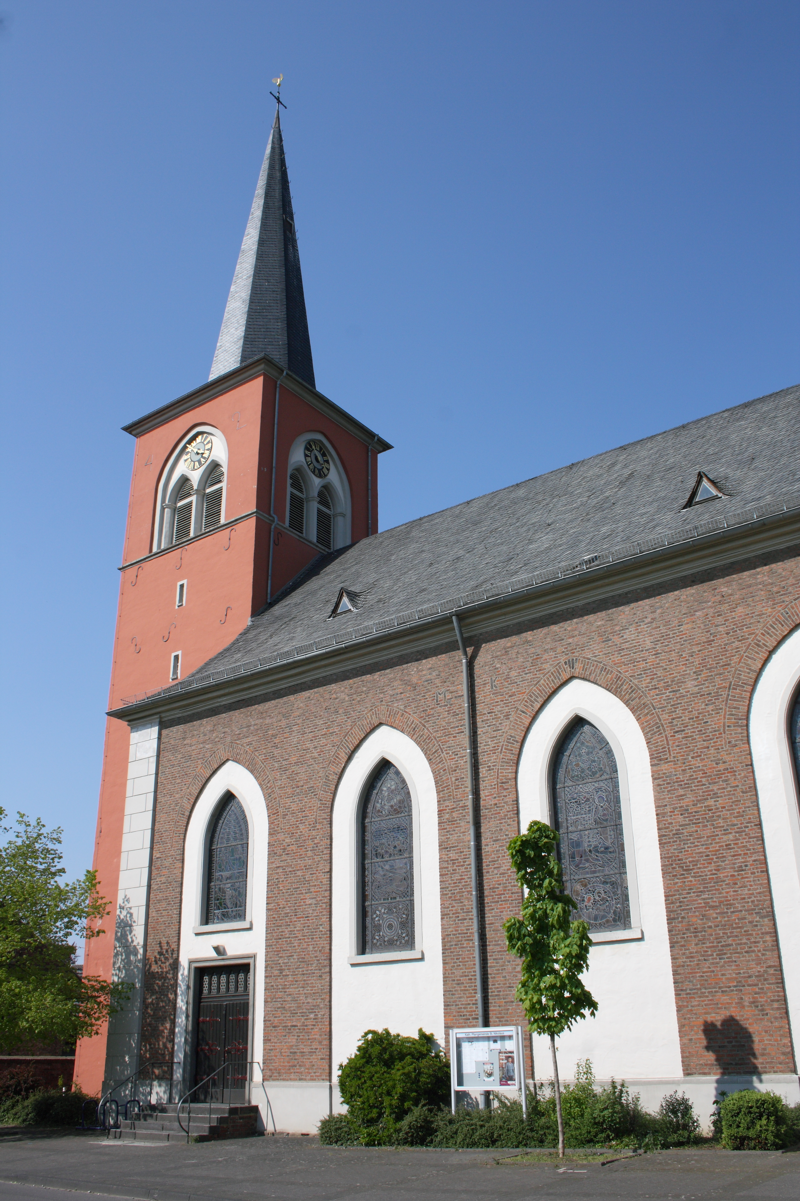 katholische Pfarrkirche St. Nikolaus in Kuchenheim